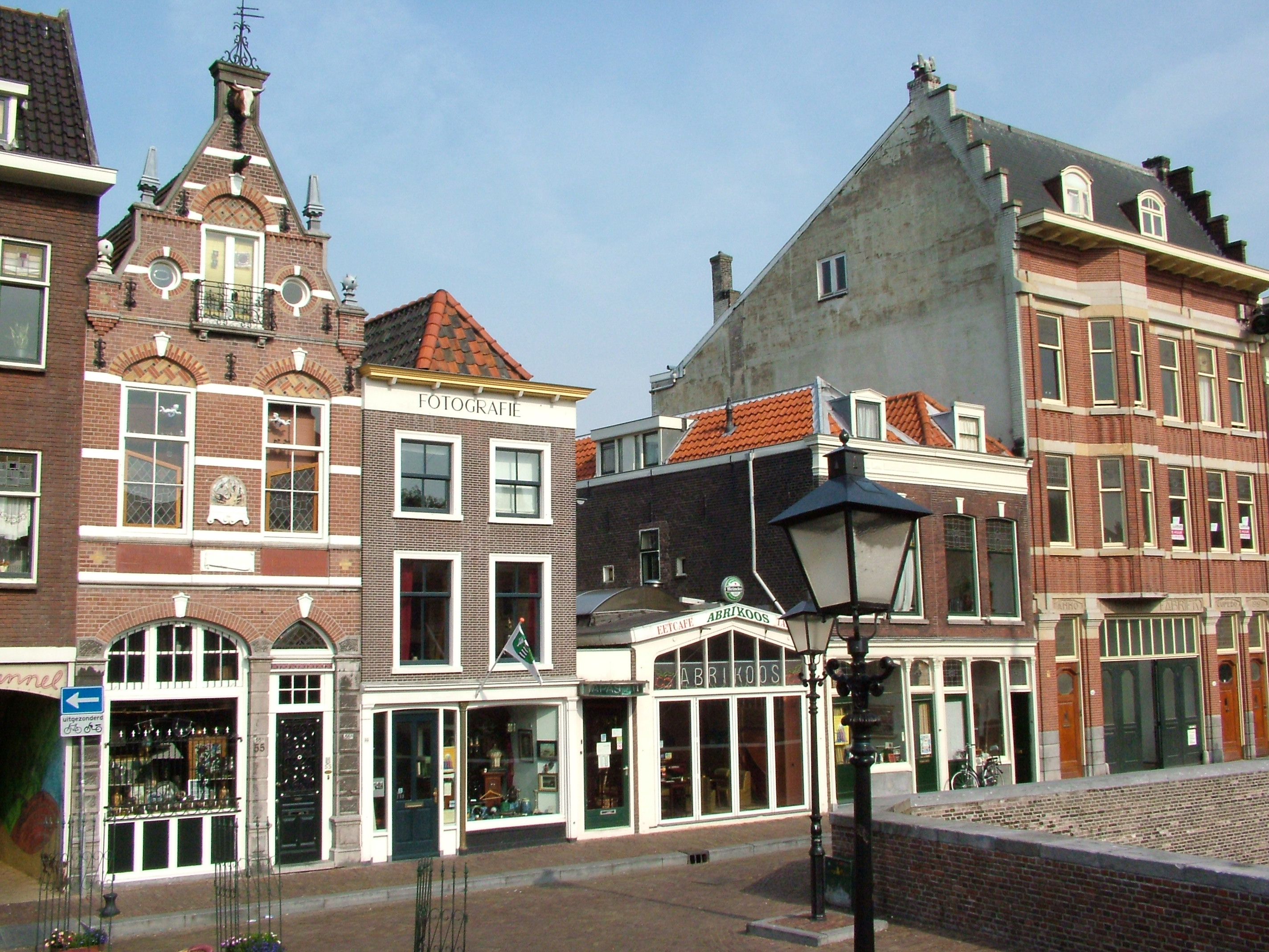 Aelbrechtskolk, Delfshaven